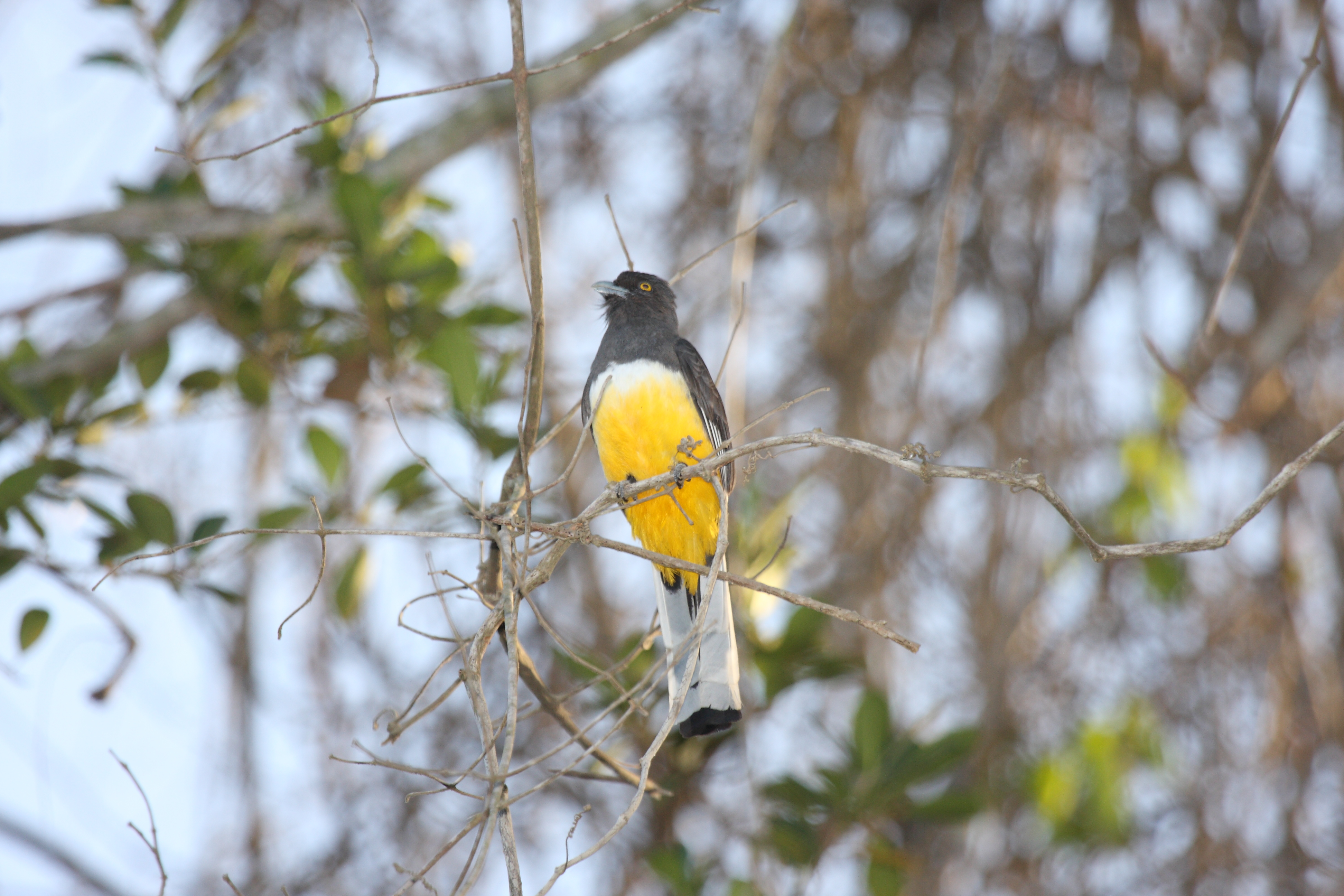 Citreoline Trogon (Trogon citreolus)